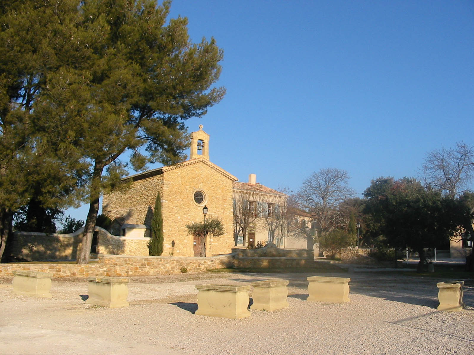 Centre du village de Saint-Marc, quartier du Bourg. Own work